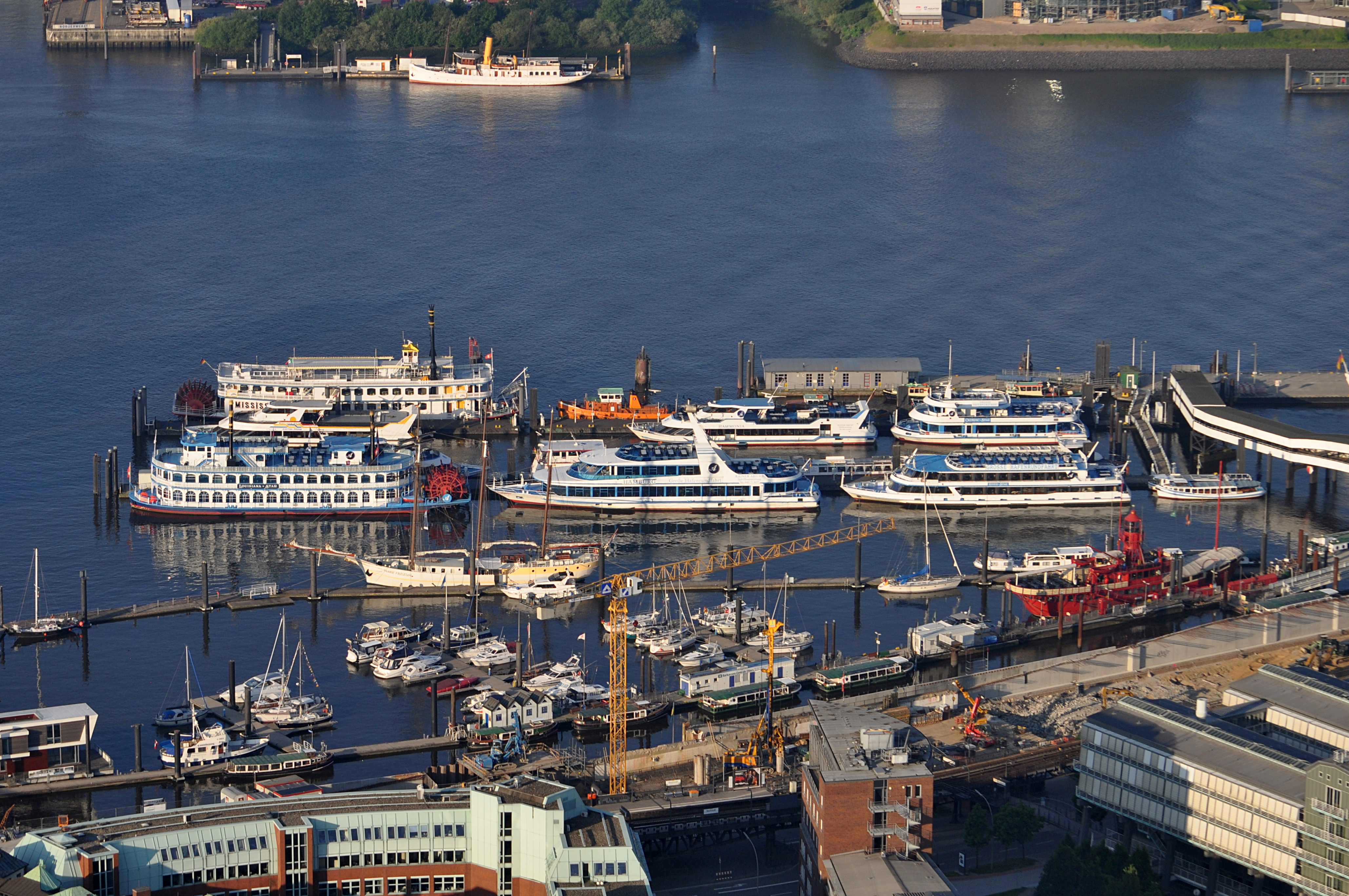 Anleger östlich der Überseebrücke (Brandenburger Hafen) in Hamburg-Neustadt.